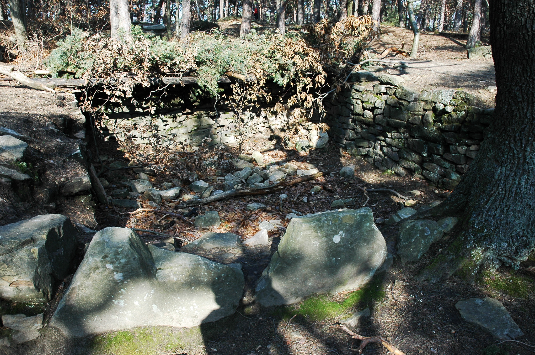 Eines der "Löcher" der Heidenlöcher bei Deidesheiim.